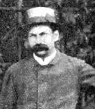 Charles-Armand Trépardoux, Histoire de l'automobile, Pierre Souvestre, éd. H. Dunod et E. Pinat, 1907 (ASIN B001BPBE58) p.159